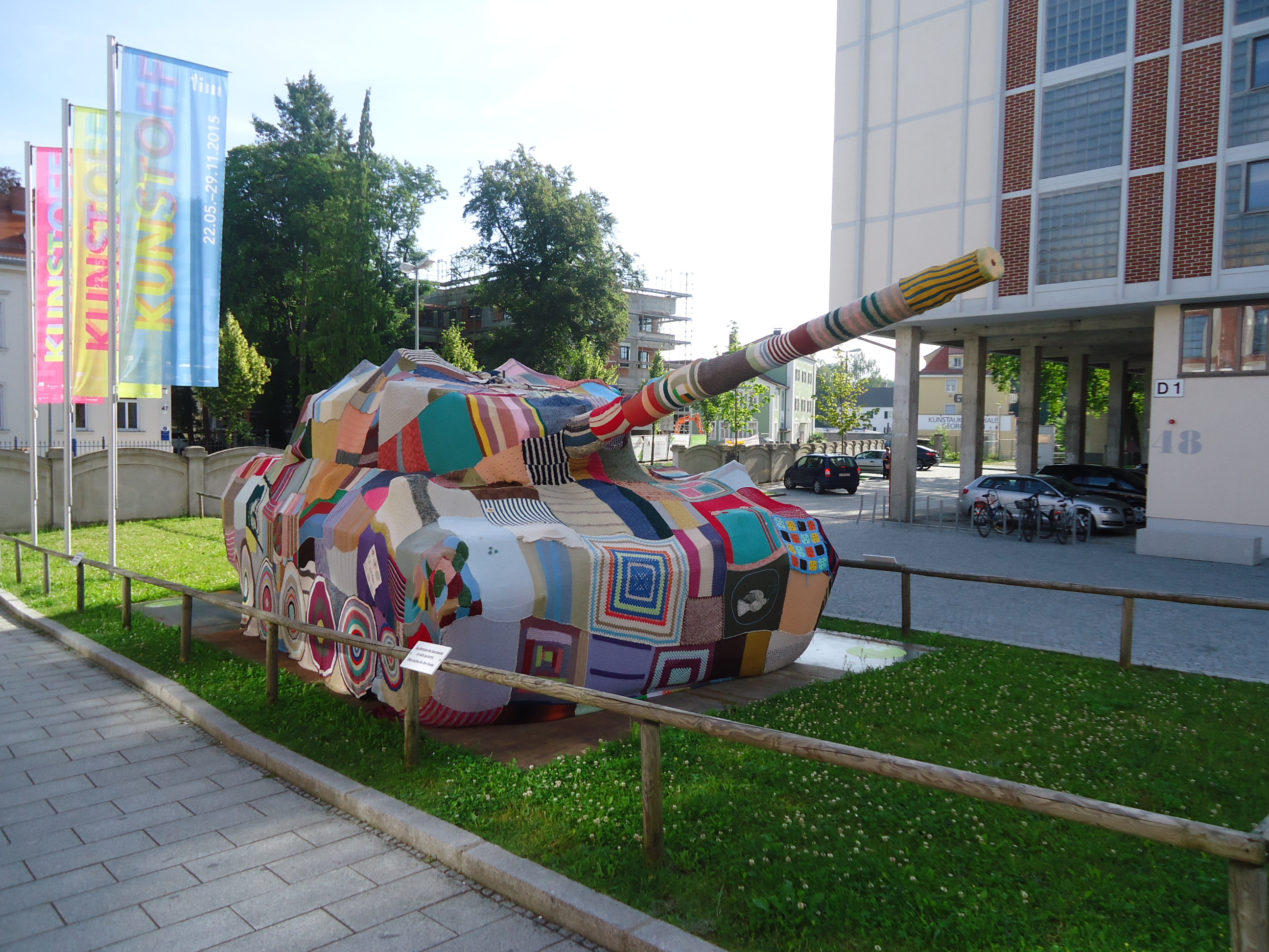 In Wolle gehüllter Panzer vor dem Textilmuseum Augsburg